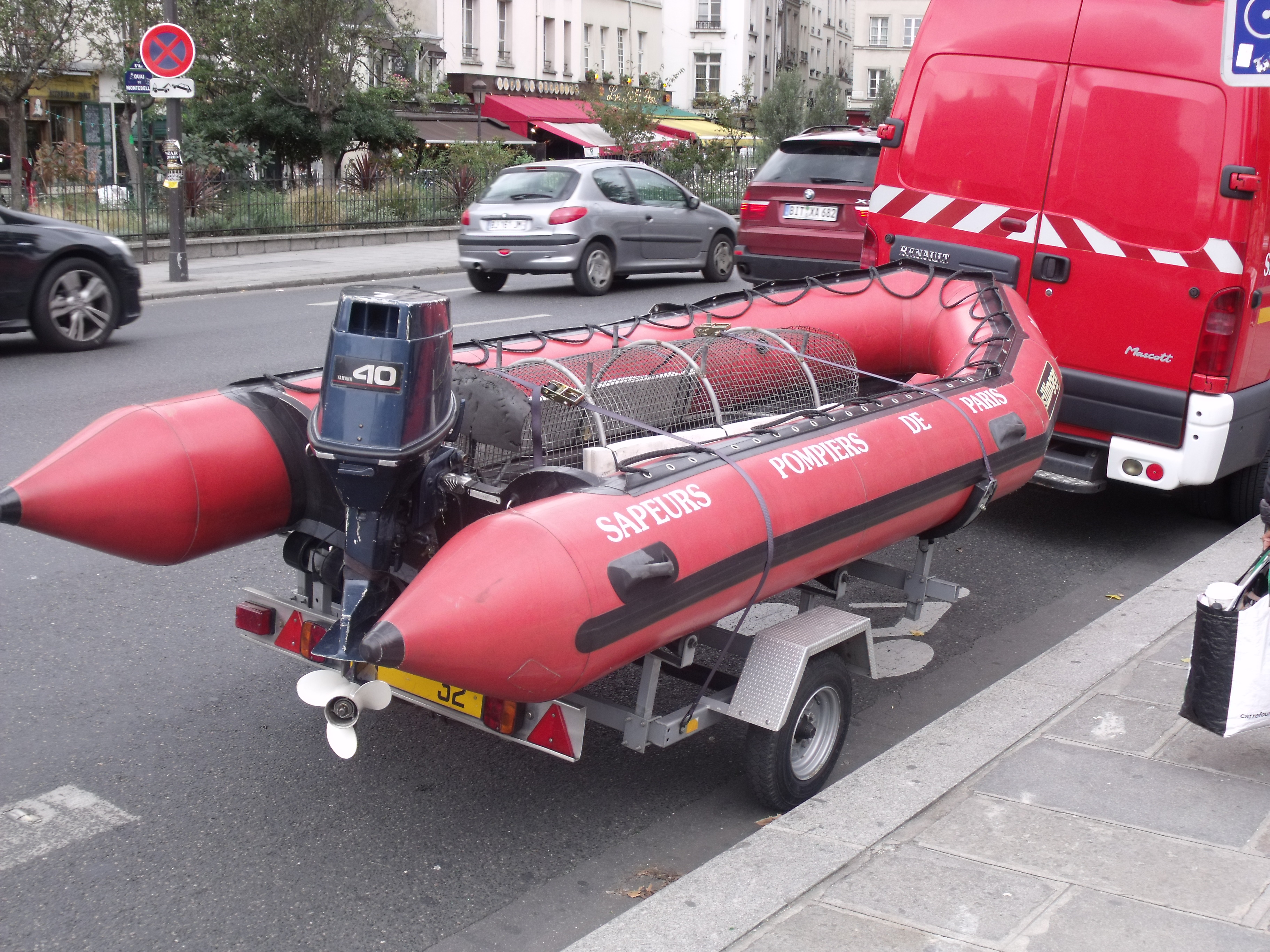 Embarcation pneumatique utilisée par les plongeurs secouristes de la Brigade de sapeurs-pompiers de Paris. Vu ici lors des Journées de Sécurité Intérieure en 2011. La remorque de transport est tractée par un véhicule de soutien plongée.